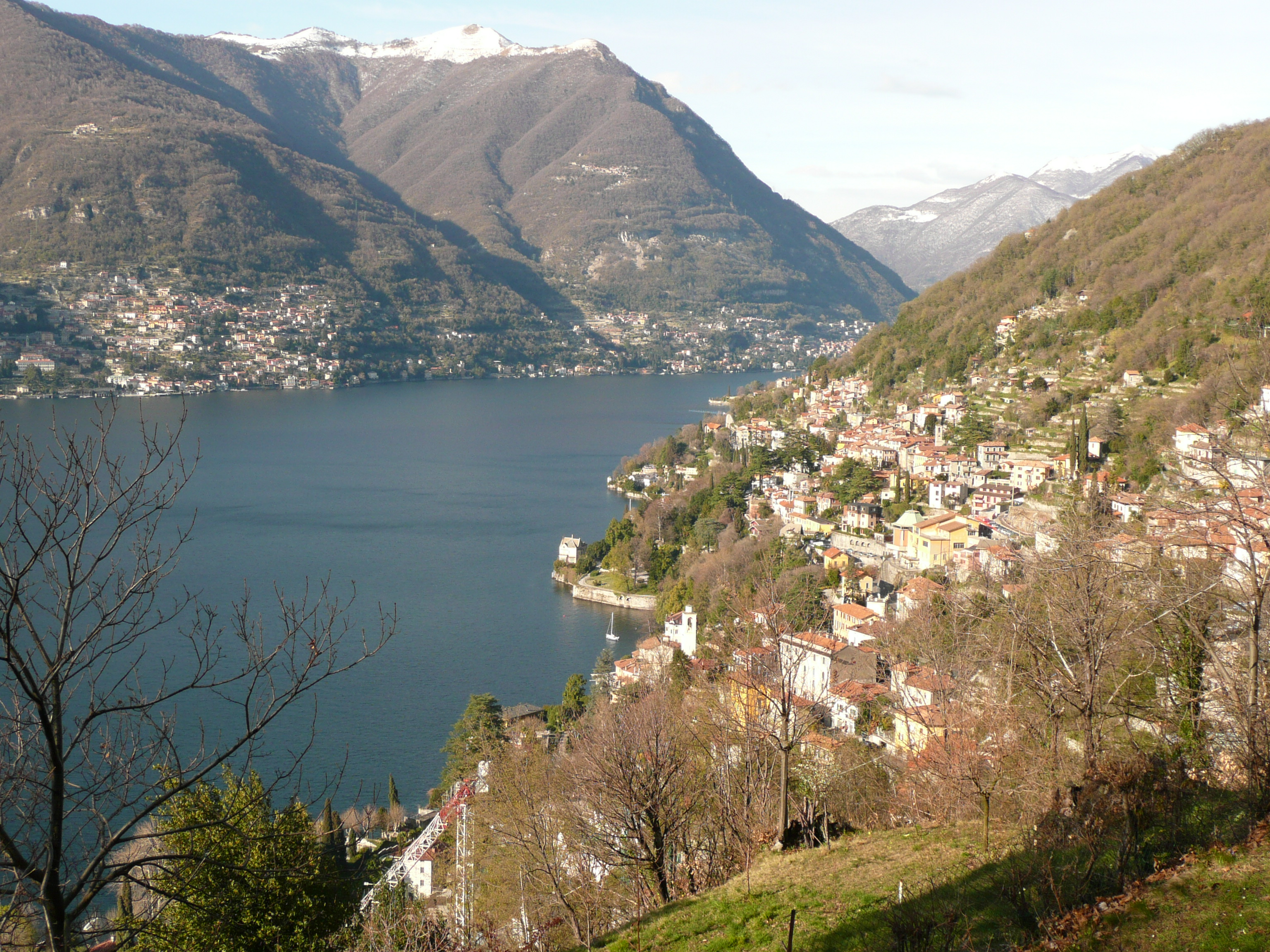 Blevio vista dal sentiero Capovico-Brunate